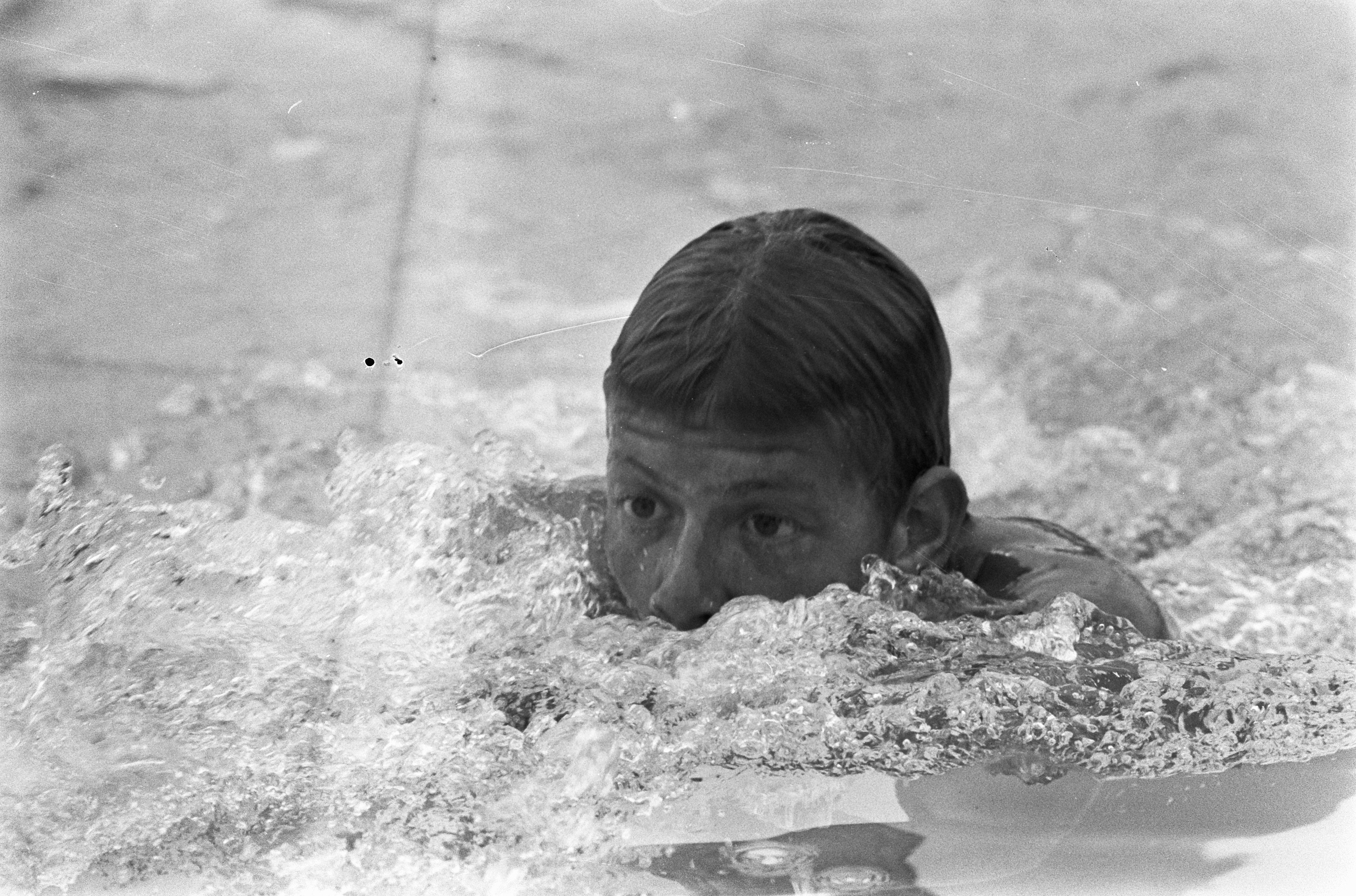 Collectie / Archief : Fotocollectie Anefo Reportage / Serie : [ onbekend ] Beschrijving : Nationale Zwemkampioenschappen in Kolpabad te Vlaardingen Hans Elzerman in aktie Datum : 28 juli 1973 Locatie : Vlaardingen, Zuid-Holland Trefwoorden : kampioenschappen, zwemmen Persoonsnaam : Kolpabad Fotograaf : Peters, Hans / Anefo Auteursrechthebbende : Nationaal Archief Materiaalsoort : Negatief (zwart/wit) Nummer archiefinventaris : bekijk toegang 2.24.01.05 Bestanddeelnummer : 926-5772